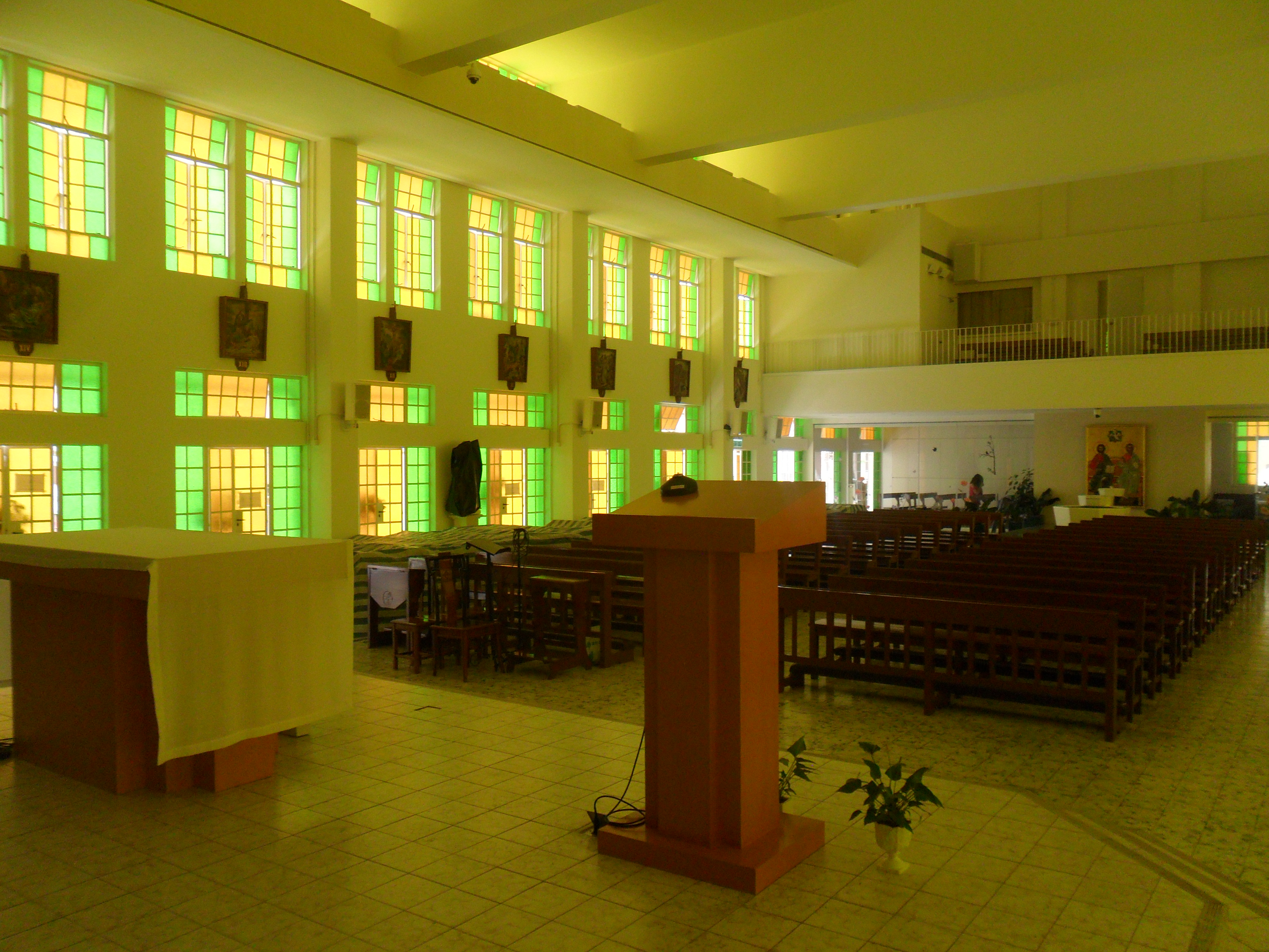 中文（香港）: 聖母玫瑰堂, 香港, 中國